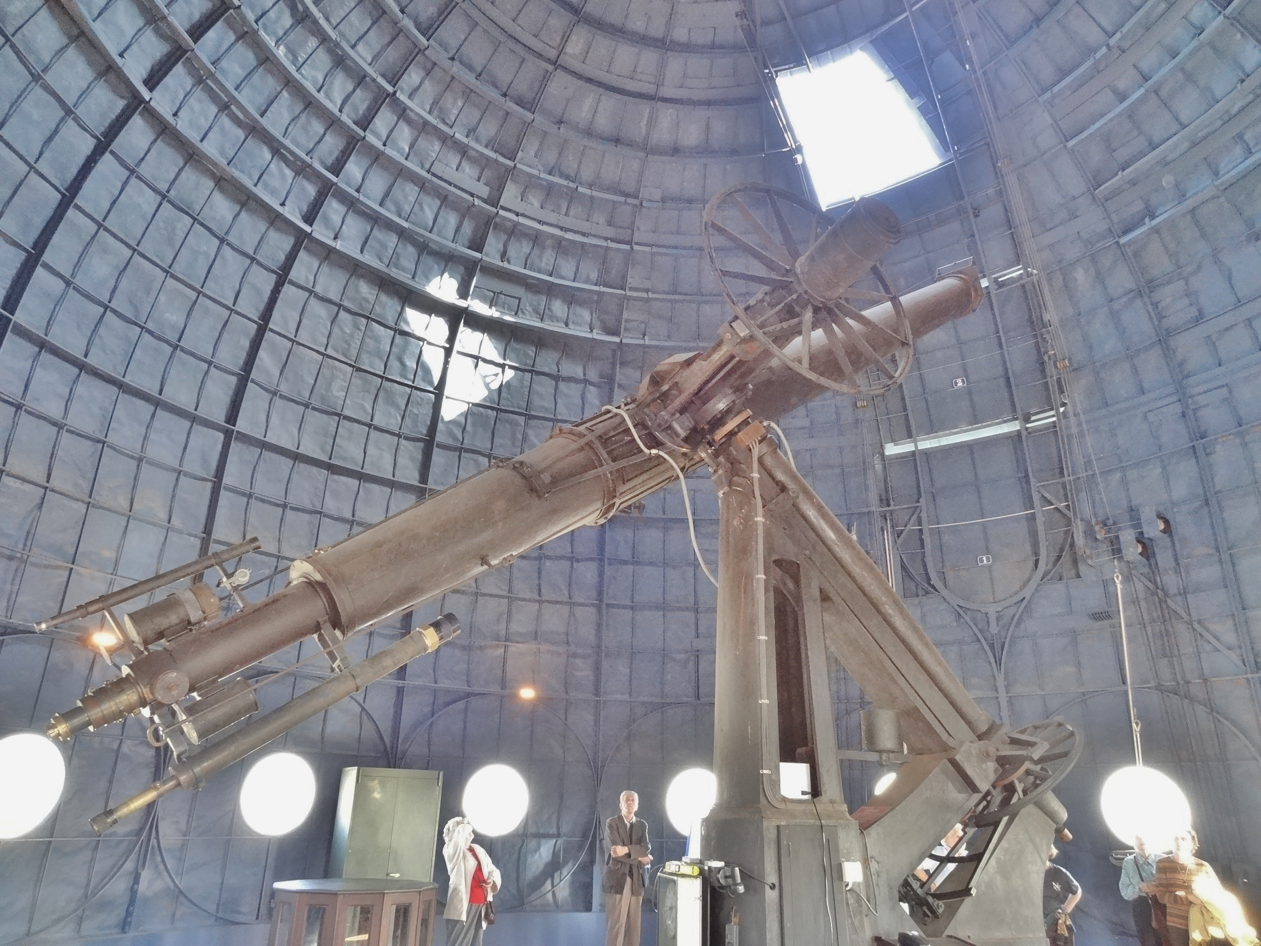 Observatoire de Paris - intérieur de la coupole - lunette